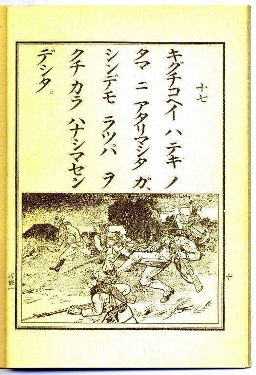 大正7年、尋常小学校1年生用修身の教科書に掲載された木口小平のエピソード。